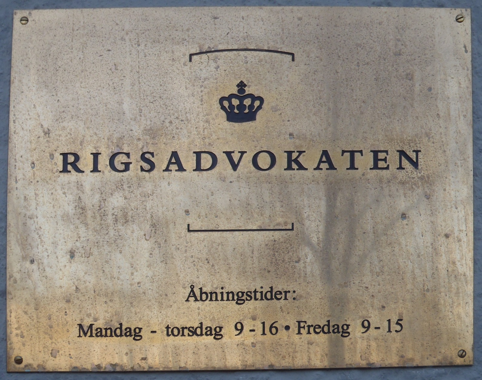 Skilt ved indgangen til Rigsadvokaten. Afperspektiveret